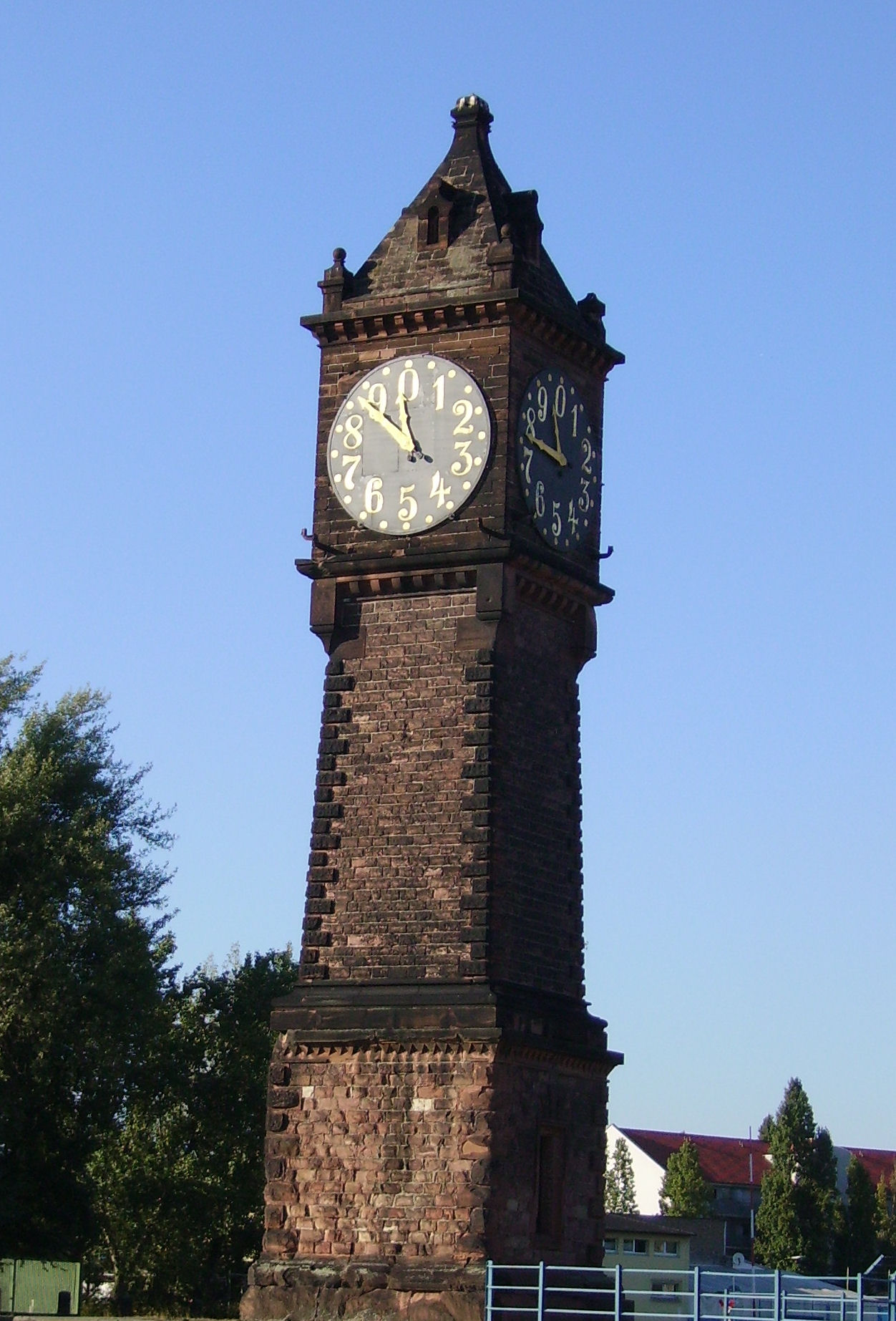 Parkinsel of Ludwigshafen in Rheinland-Pfalz (Germany)